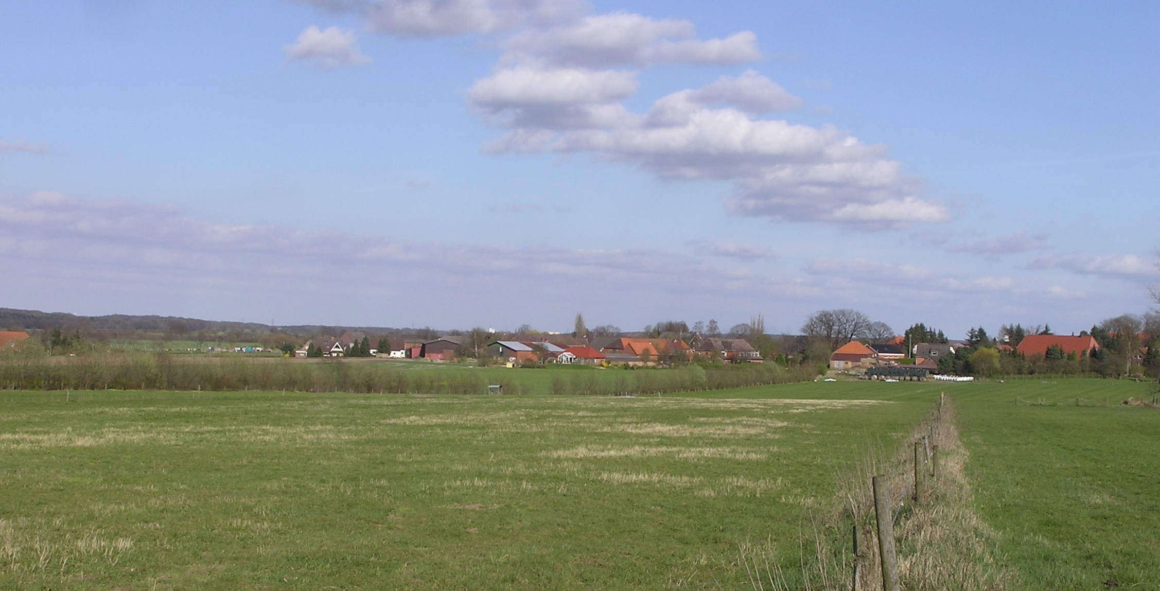 Dassendorf Dorfkern(Rundling) - Kreis Herzogtum Lauenburg, Schleswig-Holstein 53°29′33″N 10°22′33″E / 53.4925°N 10.37583°E